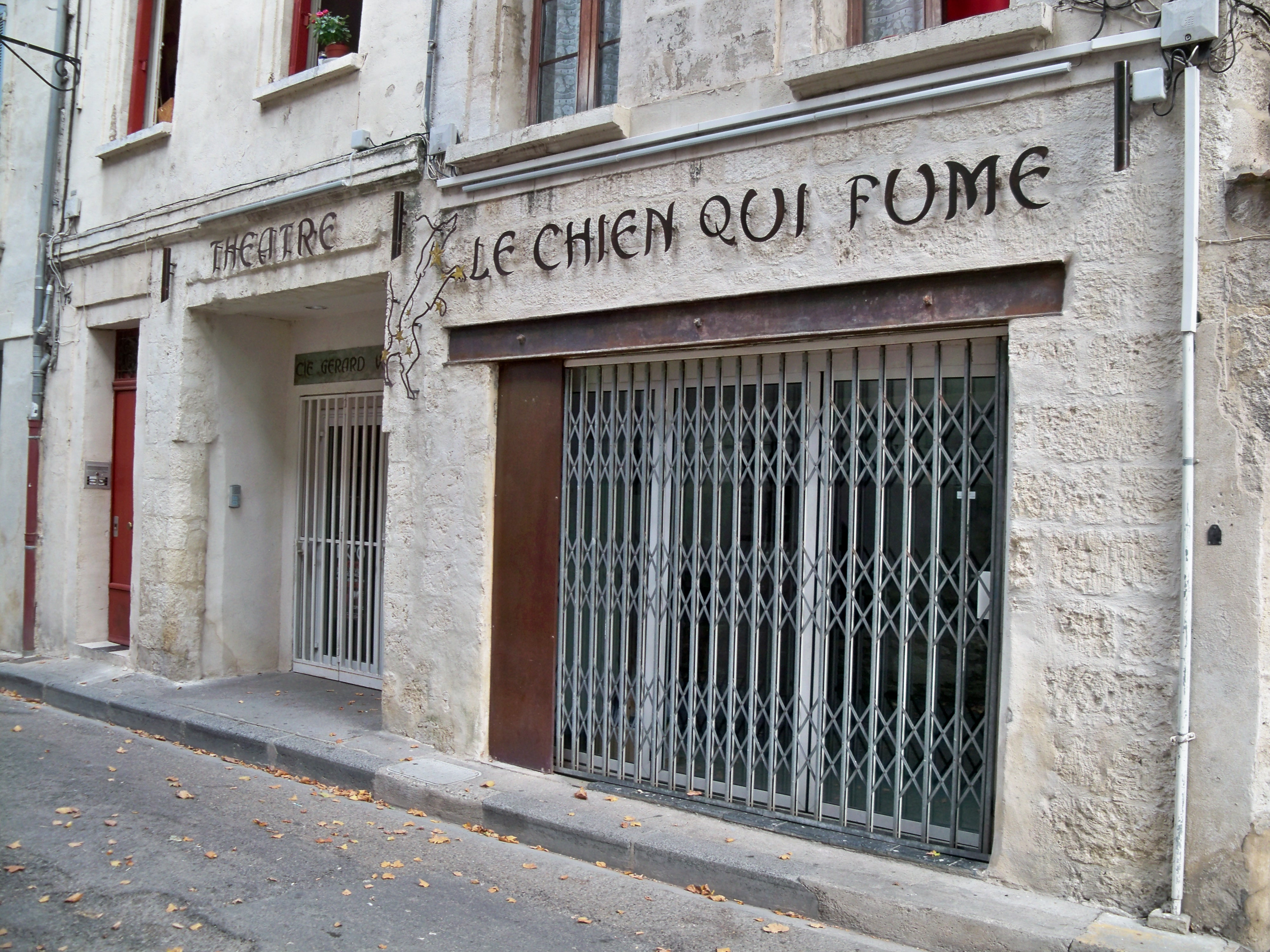 théatre le chien qui fume à Avignon